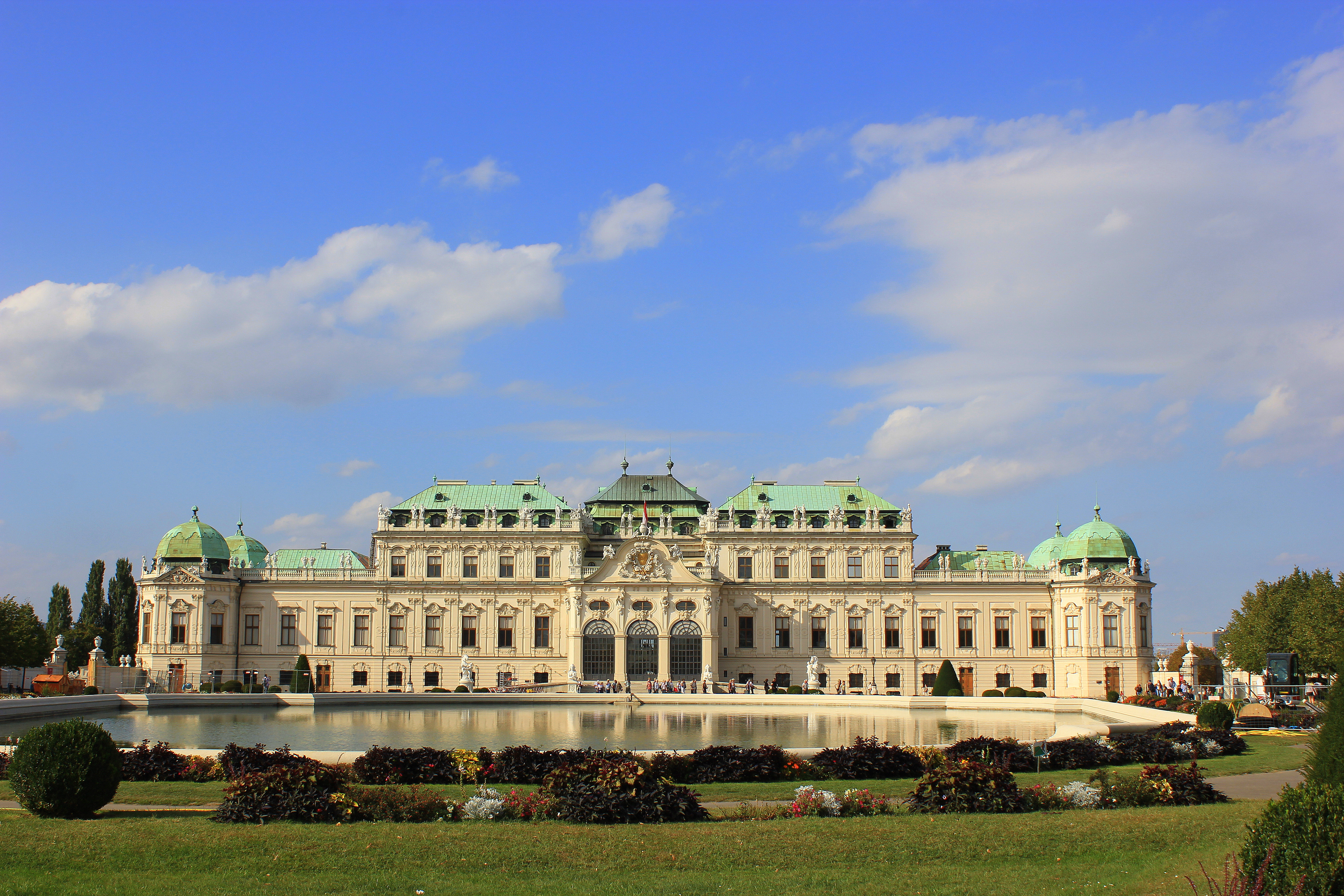 Belvedere Alto